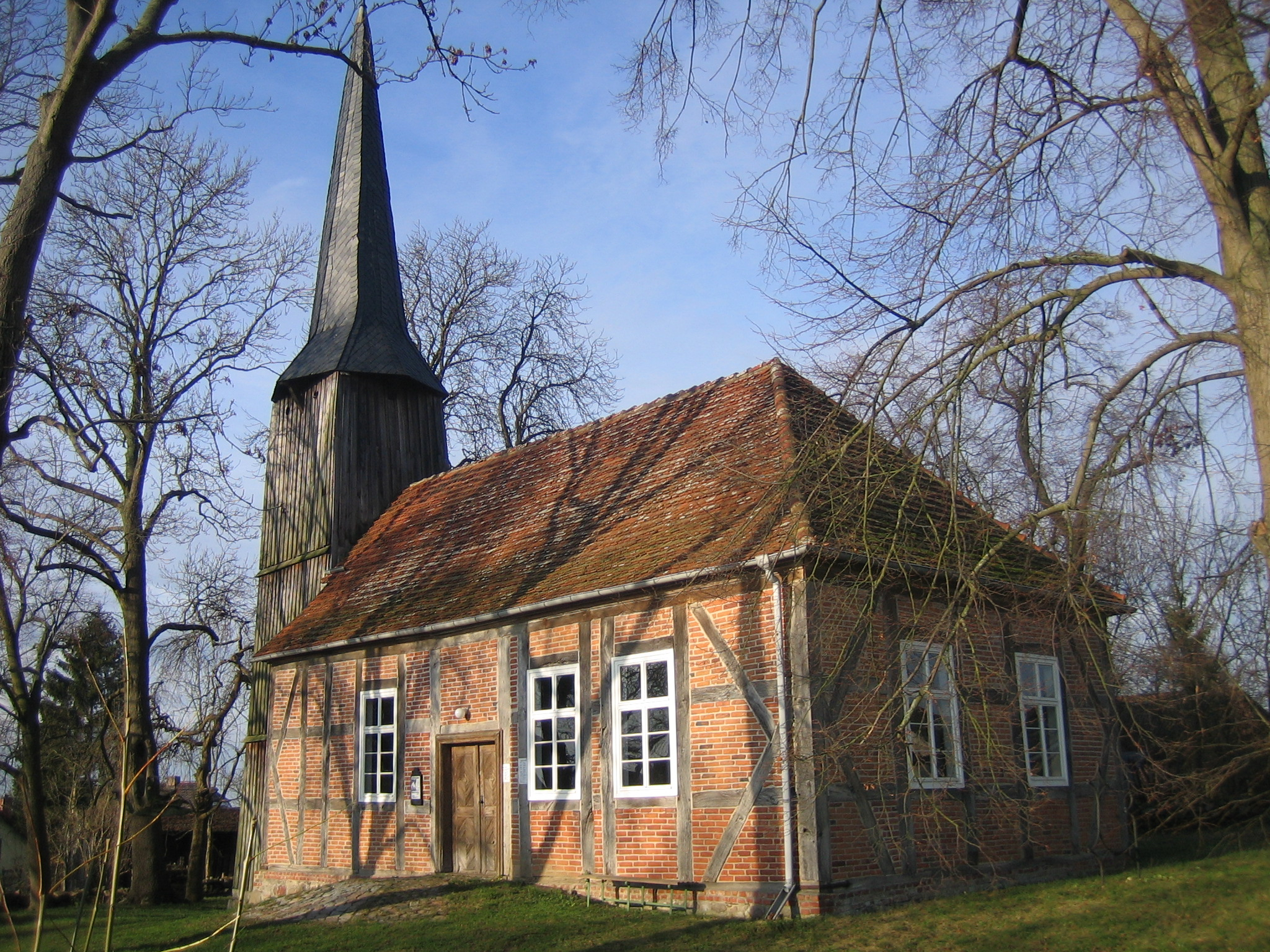 Dorfkirche Zachow, eingemeindeter Ortsteil der Gemeinde Groß Nemerow, Landkreis Mecklenburgische Seenplatte